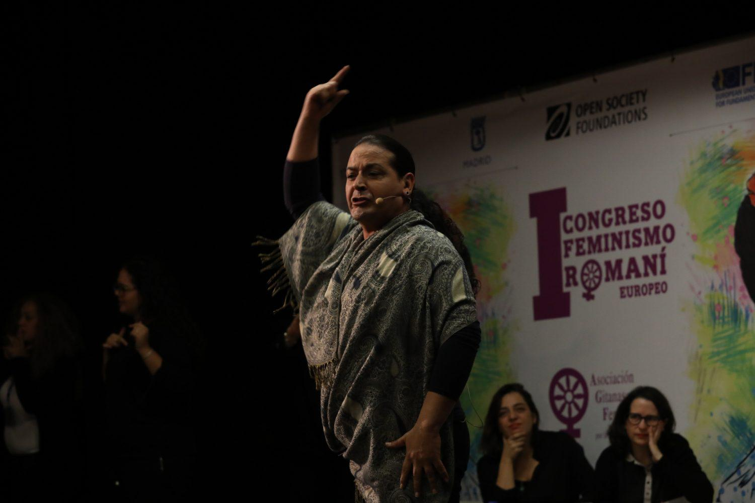 La delegada de Políticas de Género y Diversidad, Celia Mayer, ha participado en la inauguración del primer Congreso de Feminismo Romaní, organizado por la Asociación de Gitanas por la Diversidad, en colaboración con el Ayuntamiento de Madrid, la Agencia de los Derechos Fundamentales de la Unión Europea (FRA) y la Open Sociaty Foundations, y que se celebra en Madrid hoy y mañana.